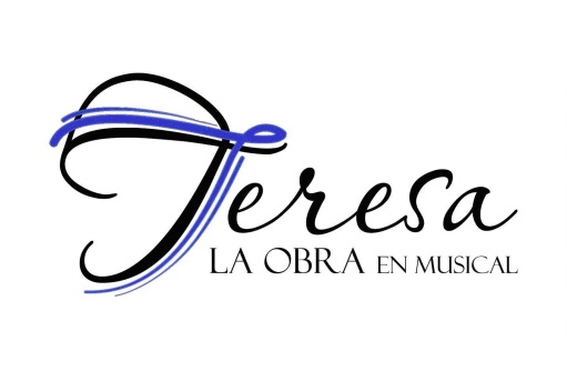 Logo de "Teresa, la Obra en Musical", musical basado en la vida y obra de la Madre Teresa de Calcuta.